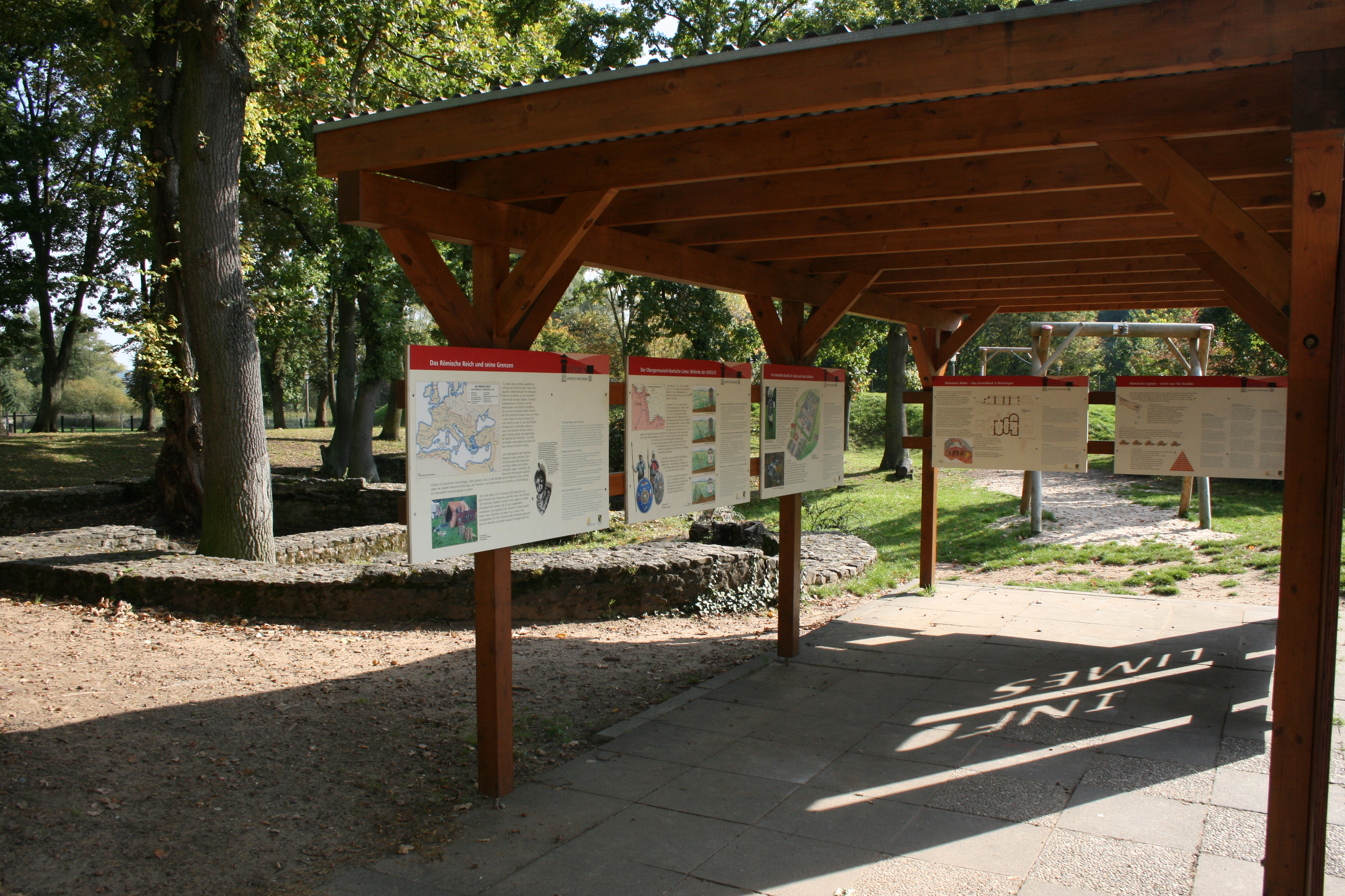 Roemisches Kastellbad Erlensee-Rückingen, Hessen, Informationstafeln vor der Badeanlage.